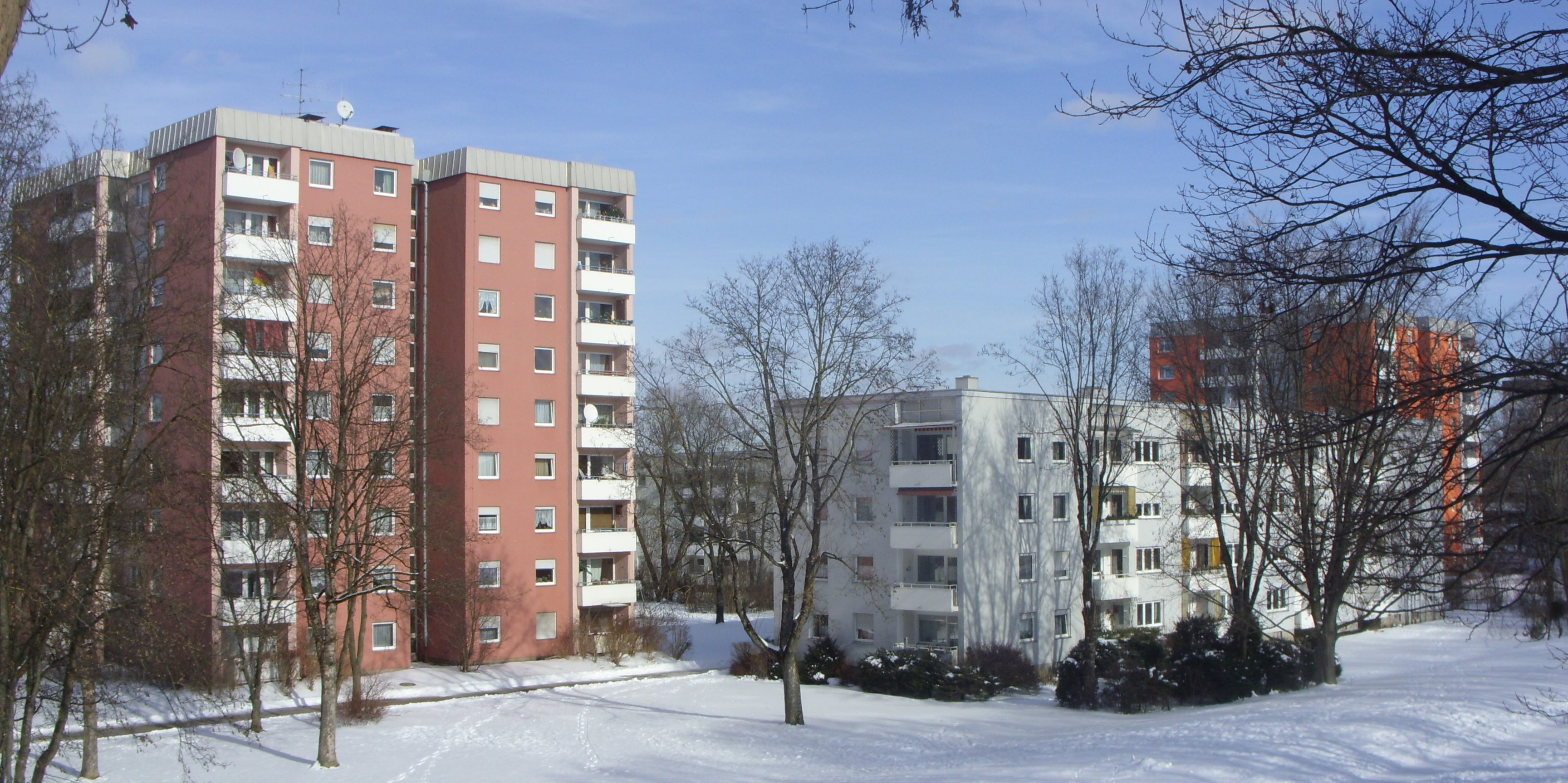 typische Mehrfamilienwohnbauten in München Blumenau